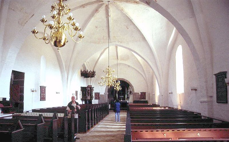 Torslev Kirke (Jammerbugt Kommune) i Danmark. Skibet set mod øst